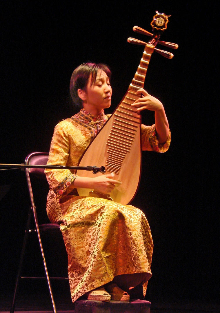 Concert "Tradition et musiques d'aujourd'hui" par Ling Ling Yu (Pipa) et Henri Tournier (flûte octobasse) spectacle dans l'auditorium du musée Guimet Une très grande artiste et une virtuose d'un instrument peu entendu en Occident. site de Linling Yu